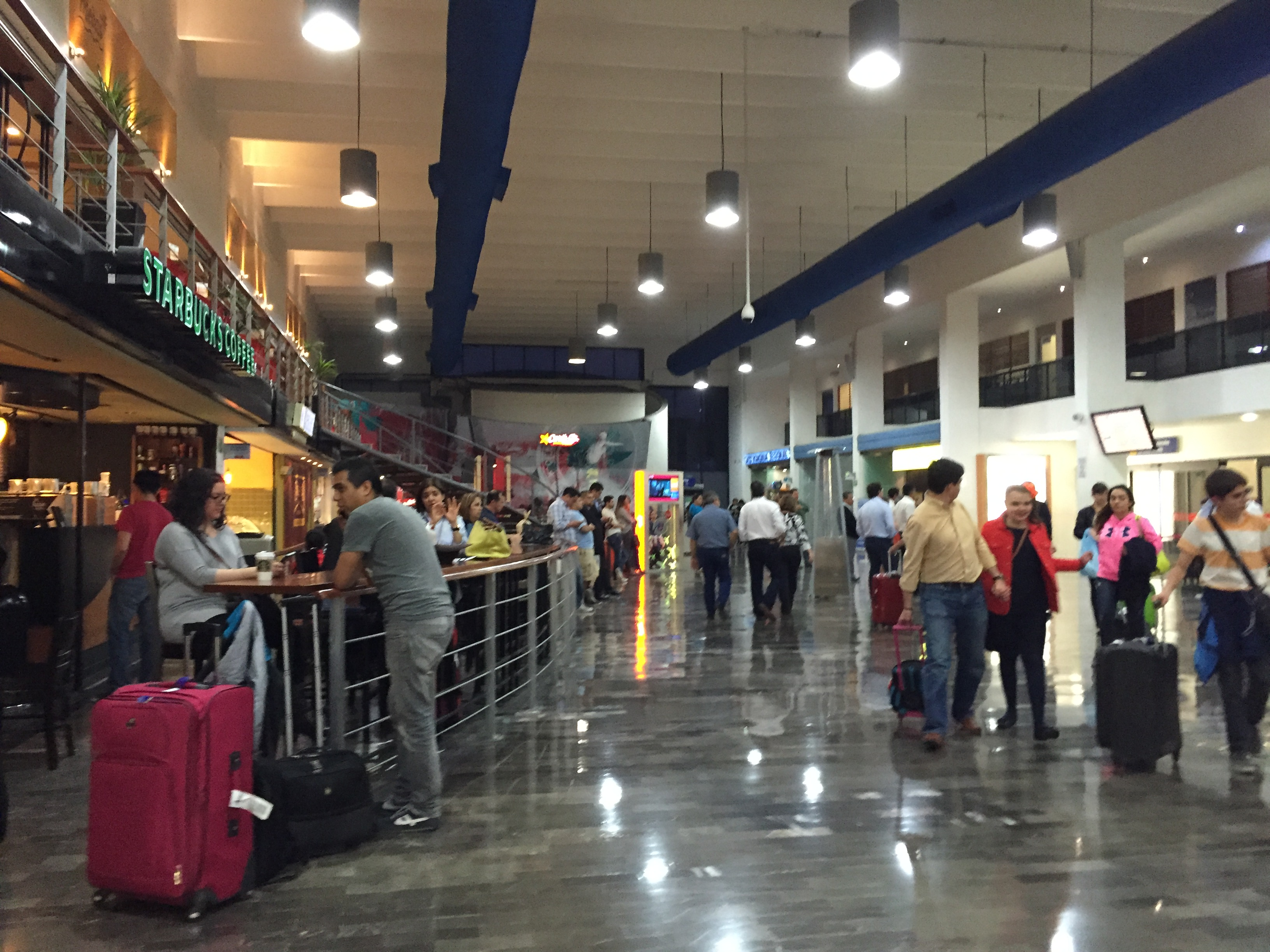 Pasillo del Aeropuerto Internacional de Monterrey.